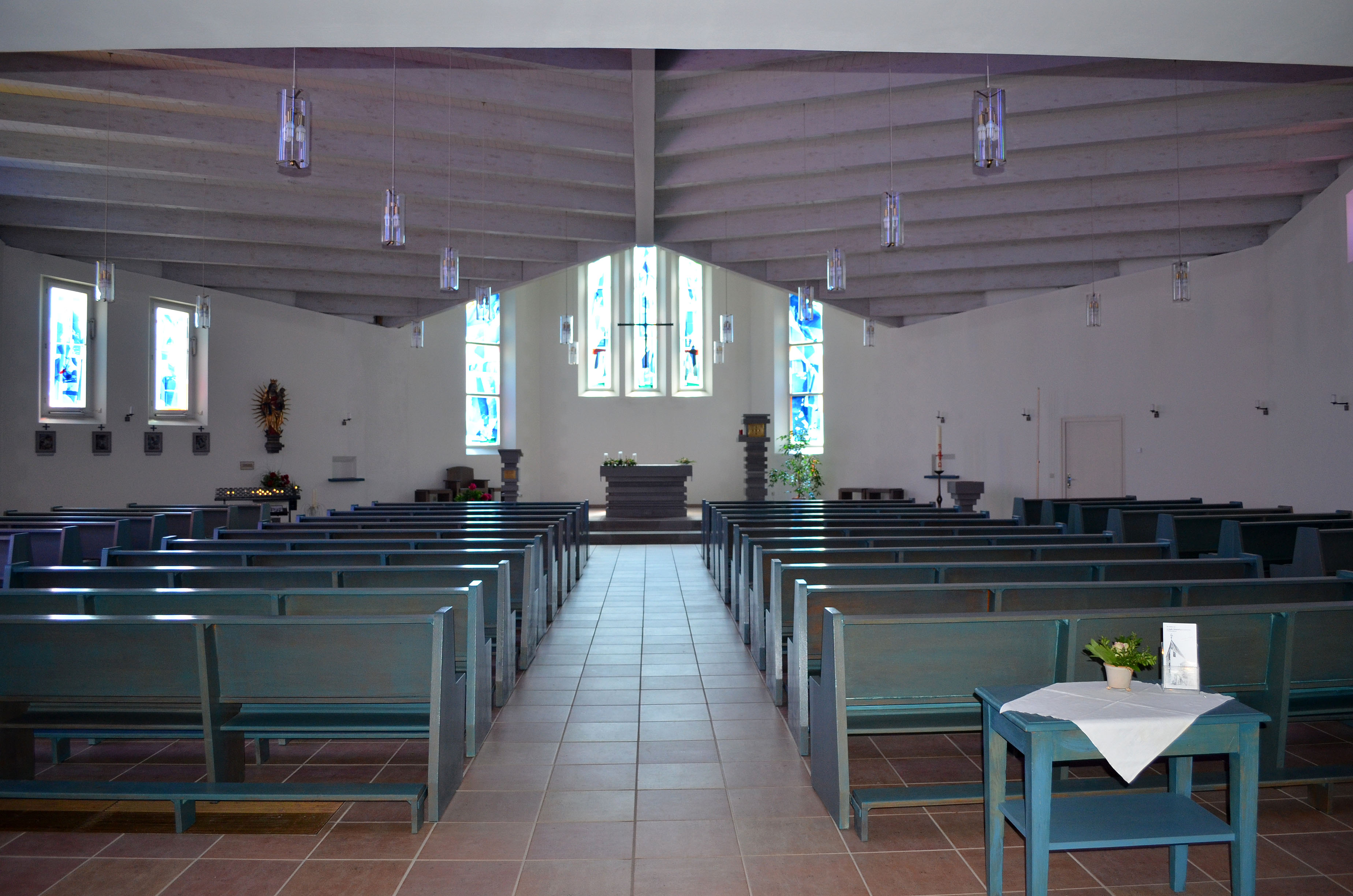 Kühlungsborn, Kath. Dreifaltigkeitskirche, Blick durch das Kirchenschiff auf den Altar